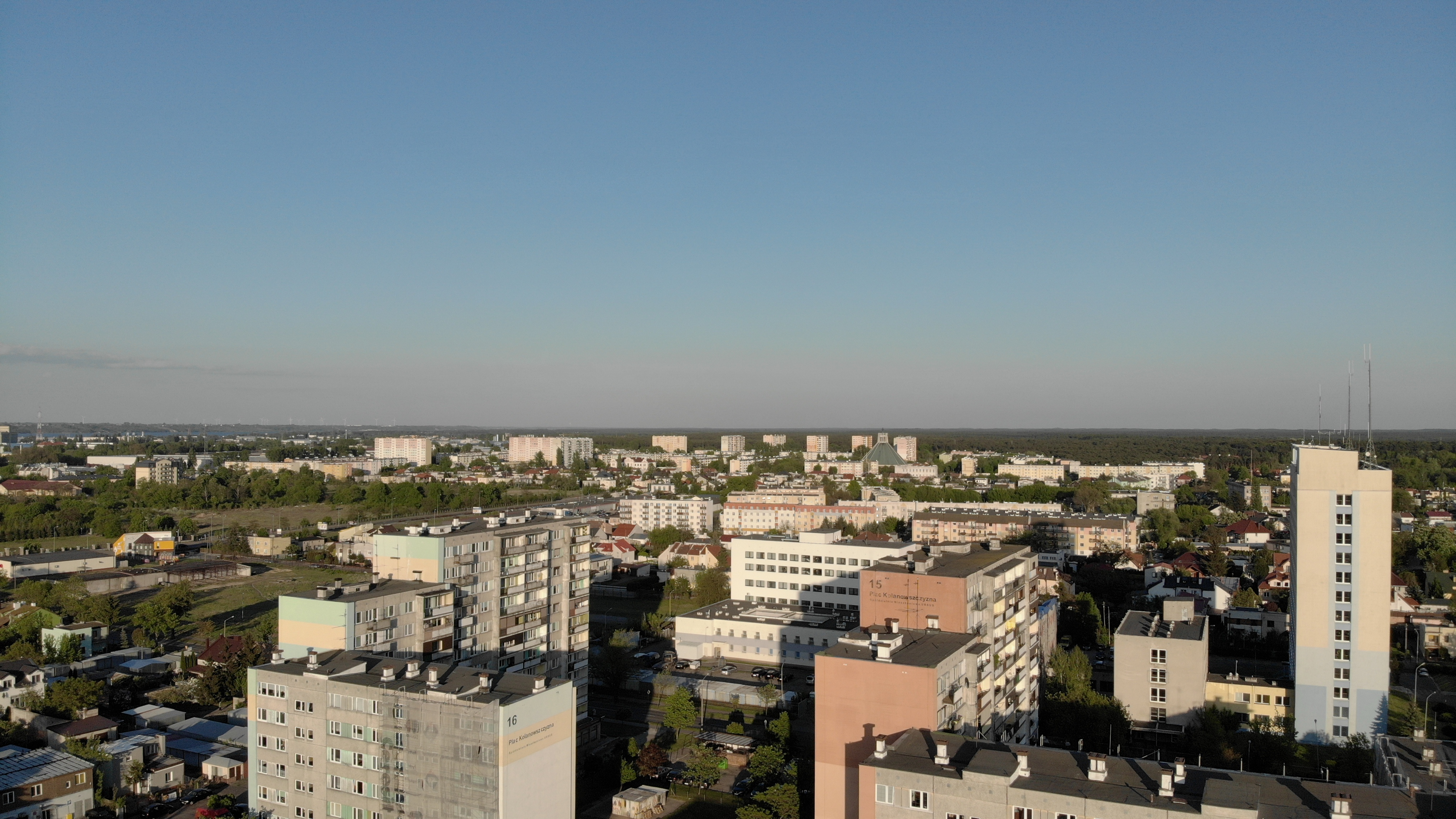 Styk Śródmieścia i Kazimierza Wielkiego (2020 r.)